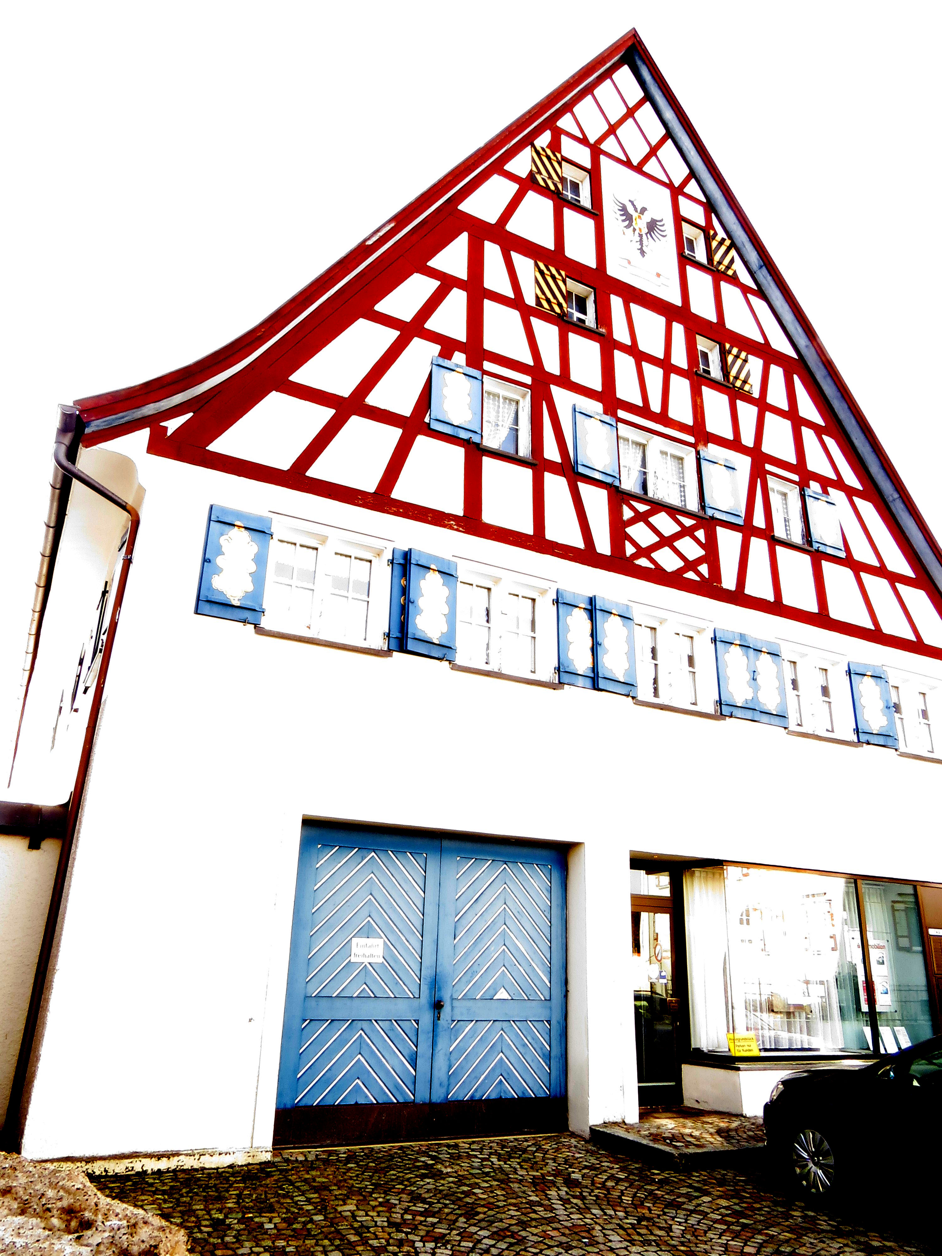 Ehem. Salzstadel in Simmerberg, Weiler-Simmerberg